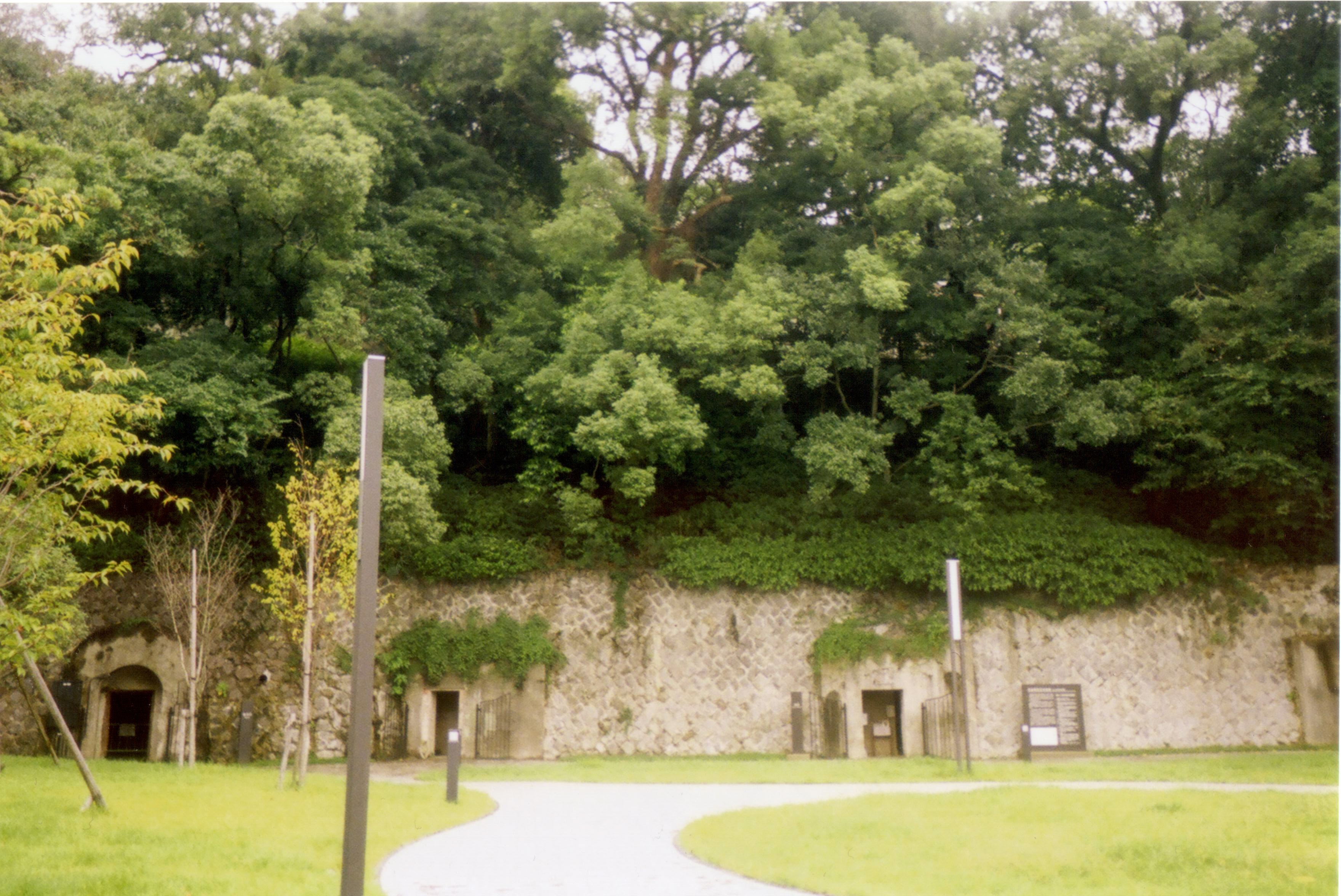 Air-raid shelter in Tateyama, Nagasaki, Nagasaki